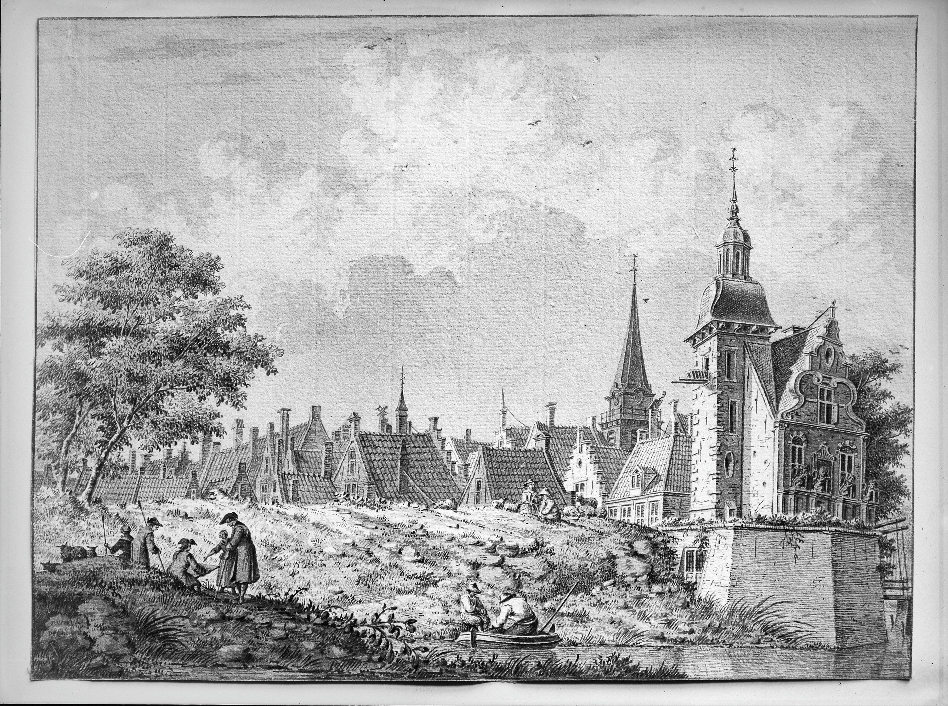 Woerden aan de Lijdse poort, naar Oostindische inkttekening door D.Verrijk in bezit van Gemeente Archief Leiden